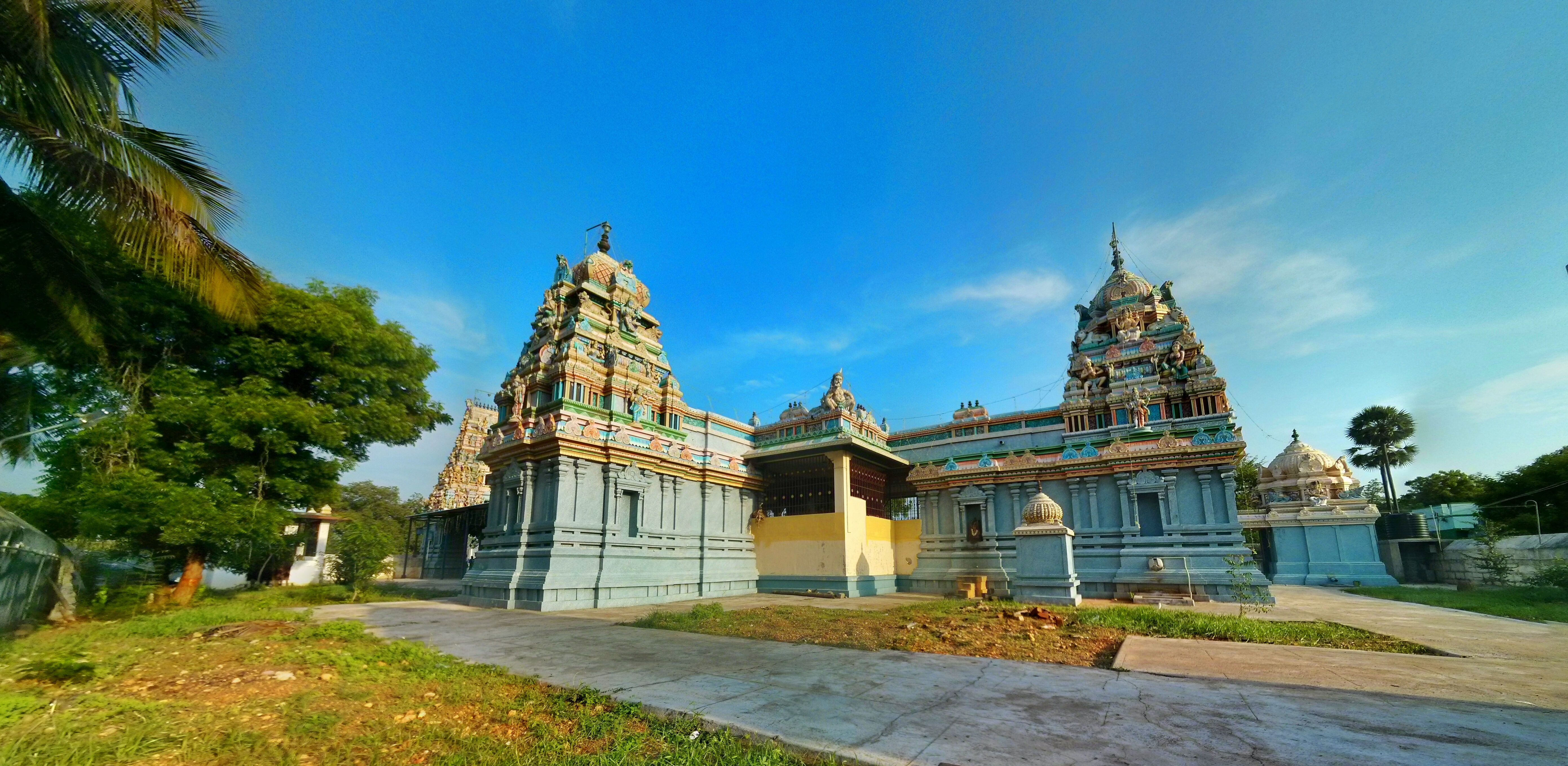 ஸ்ரீ பிரியா விடை நாயனார் பொன்னா விடைச் செல்வி திருக்கோவில்